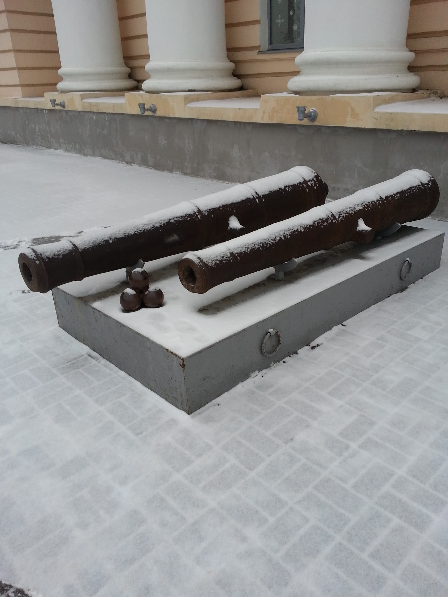 Leninskiy rayon, Tambov, Tambovskaya oblast', Russia